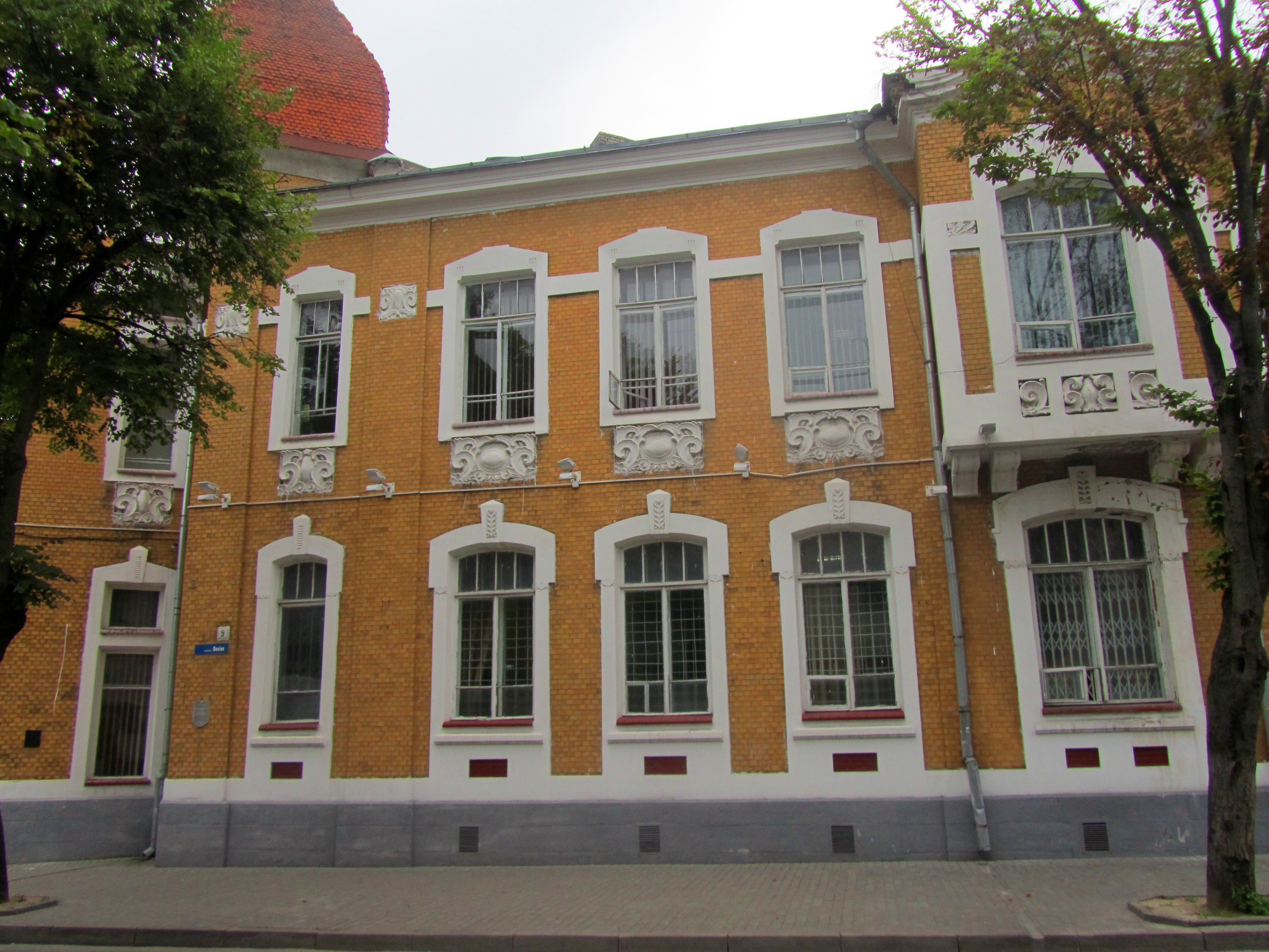 Беларуская (тарашкевіца): Будынак былога пазямельнага банка(архітэктар Б.П. Астравумаў) This is a photo of Belarusian heritage monument. Reference number: 412Г000656 ( WLM)